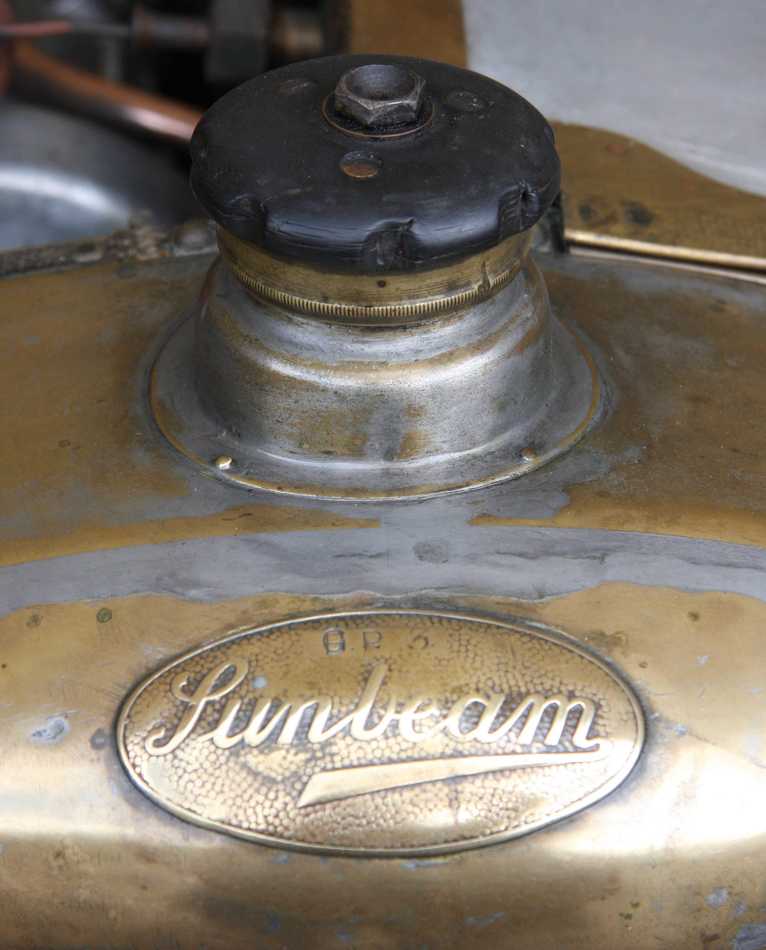 Sunbeam badge